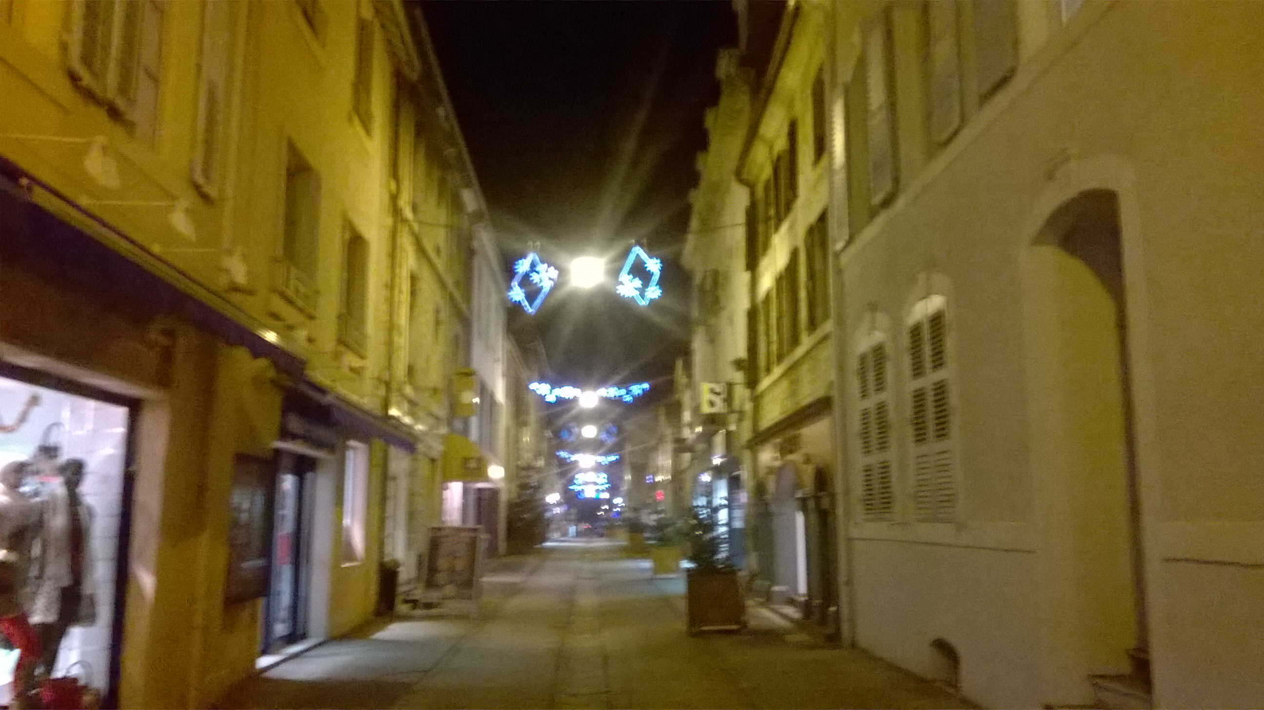 La rue du Breuil de Vesoul